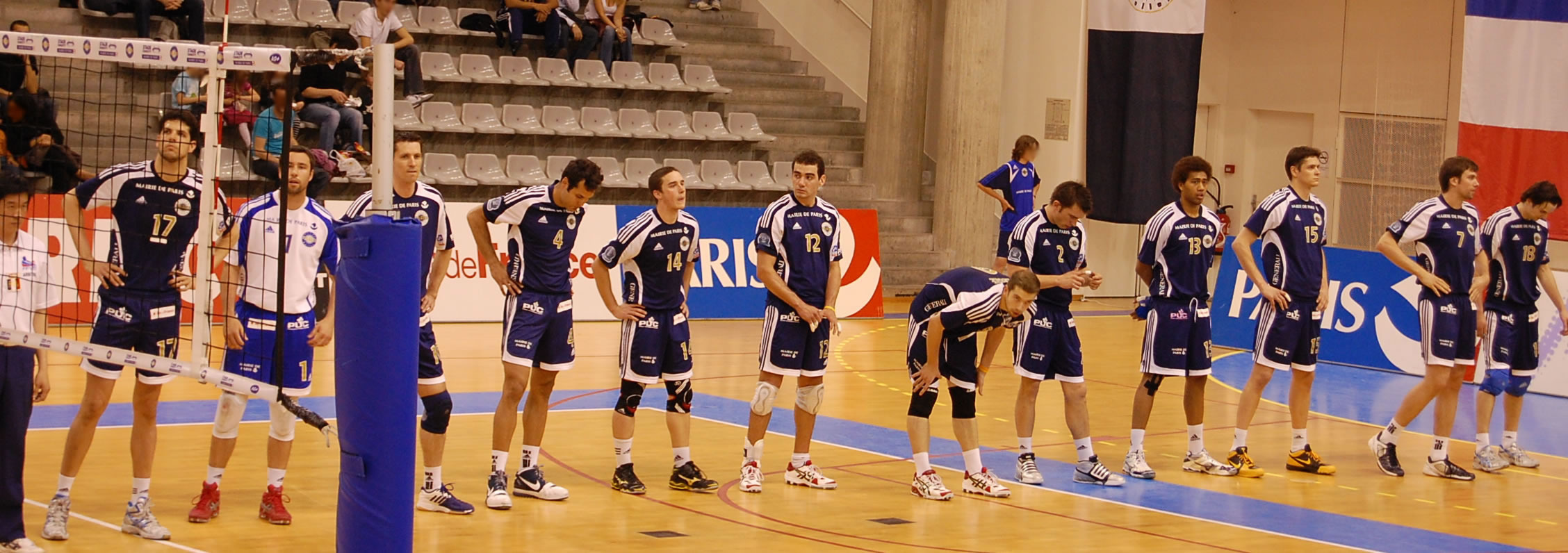 Equipe du Paris volley lors de la saison 2008/2009.